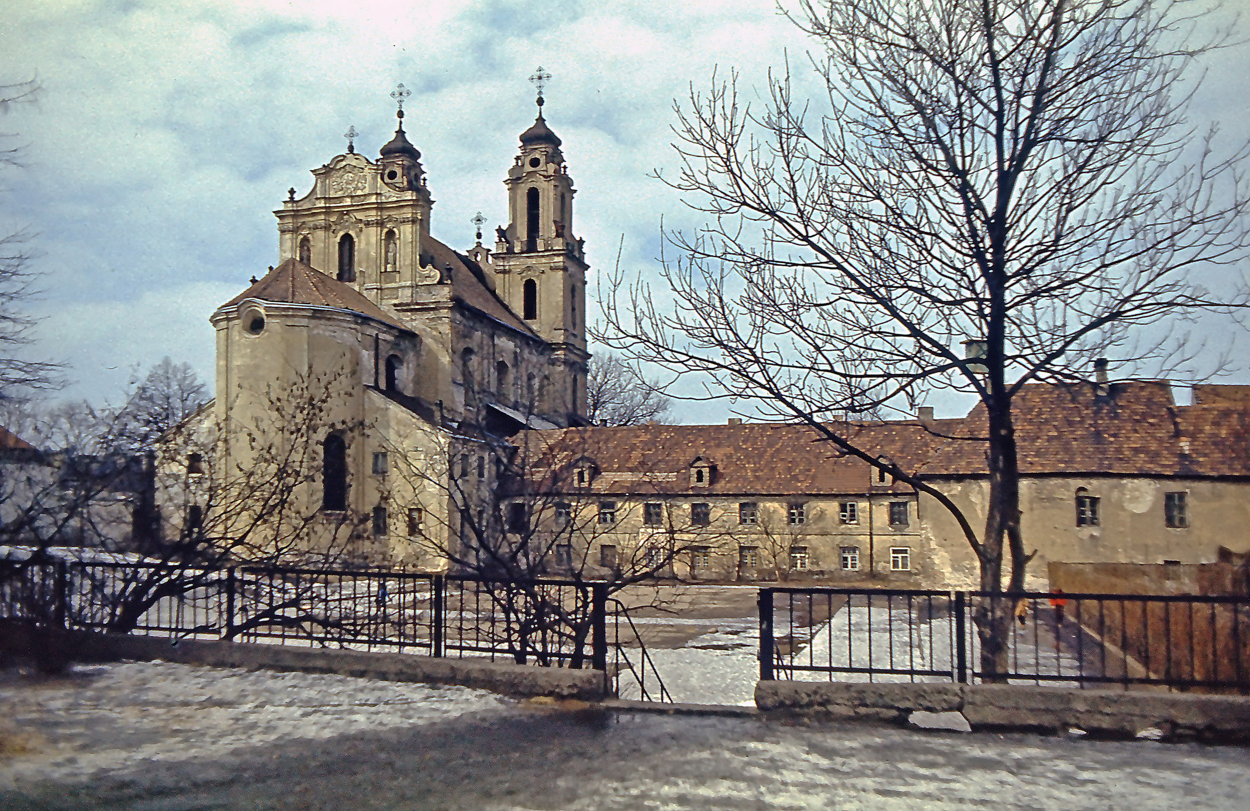 Беларуская (тарашкевіца): 111111